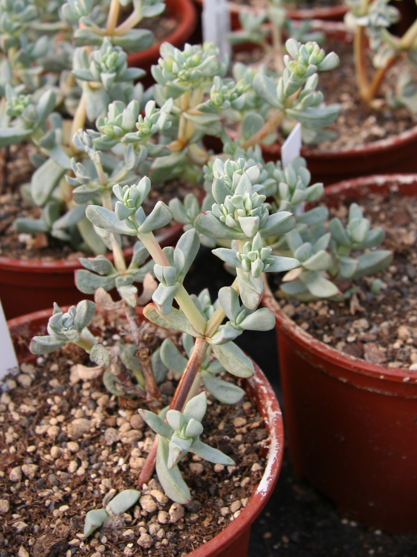 Oscularia piquetbergensis in Kultur bei Kakteen-Haage in Erfurt